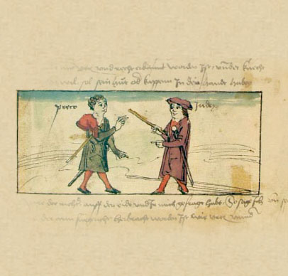 Volkacher Salbuch, Richter und Gerichtsdiener folio 395r